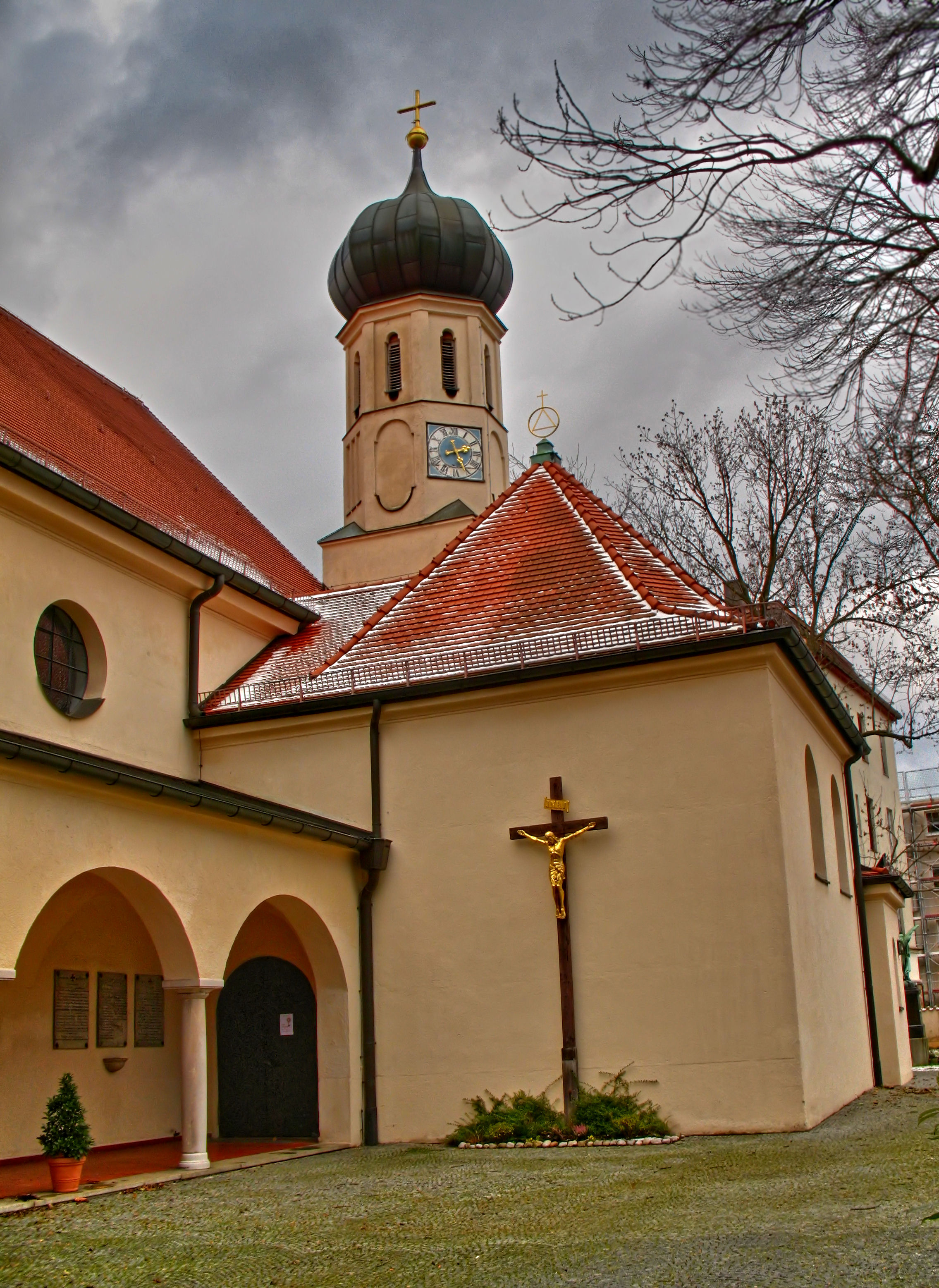 Germany, Bavaria, Munich, Kirche Sankt Ulrich in Laim